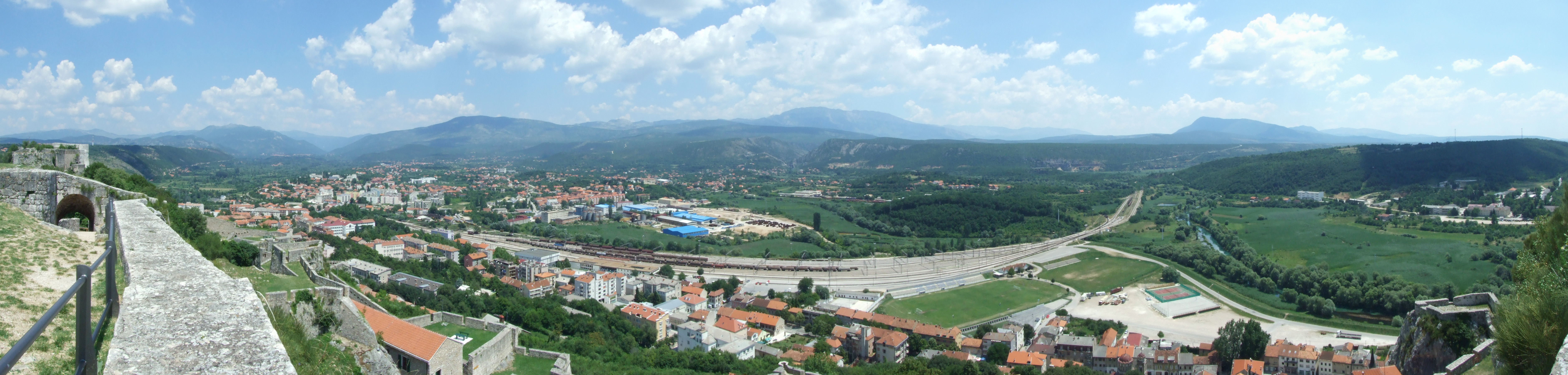 Panorama grada Knina, slikanog s Kninske tvrđave. Fotografirano 3. srpnja 2010.